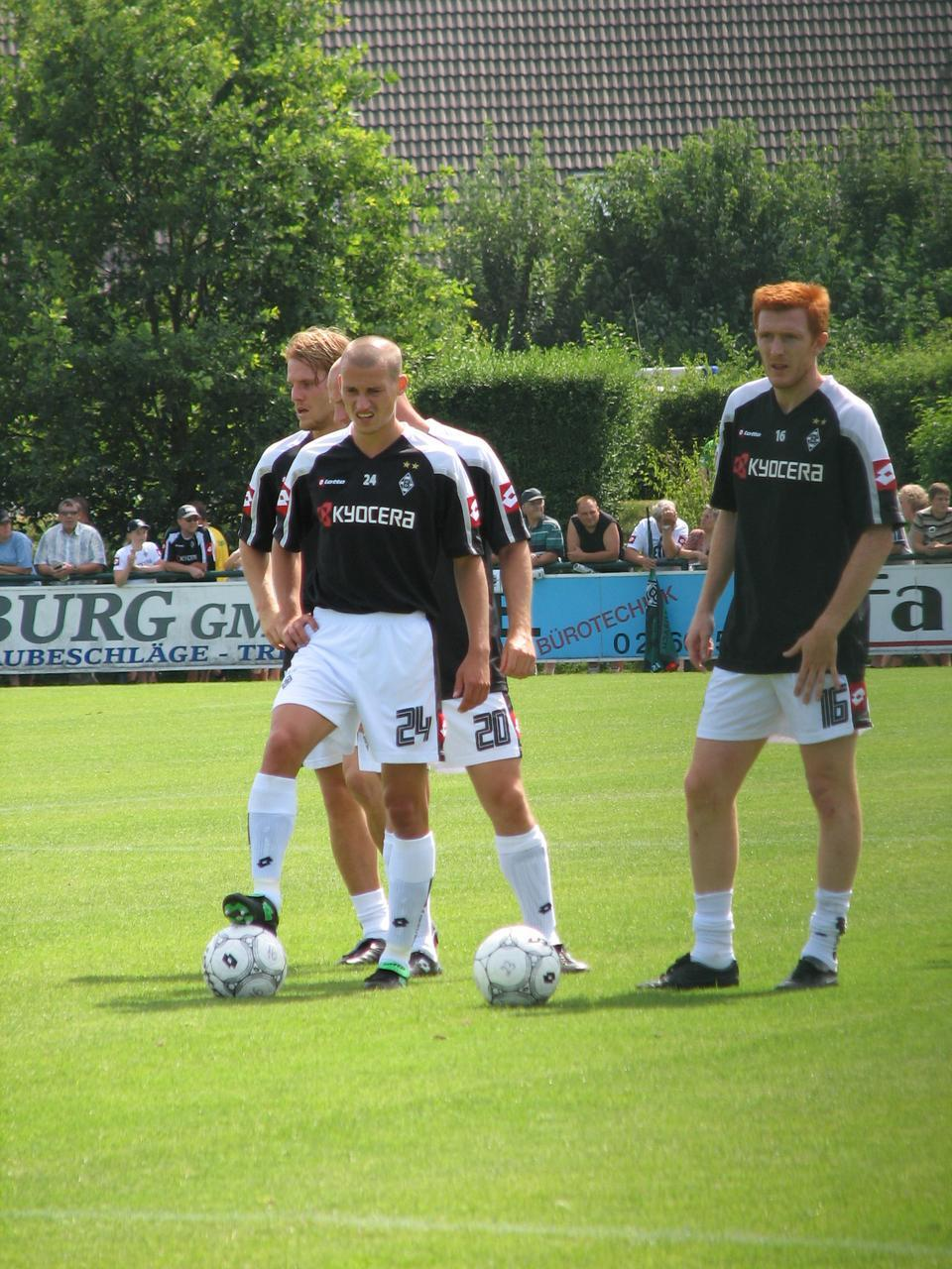 Bernd Thijs (#16) and Peer Kluge (#24)